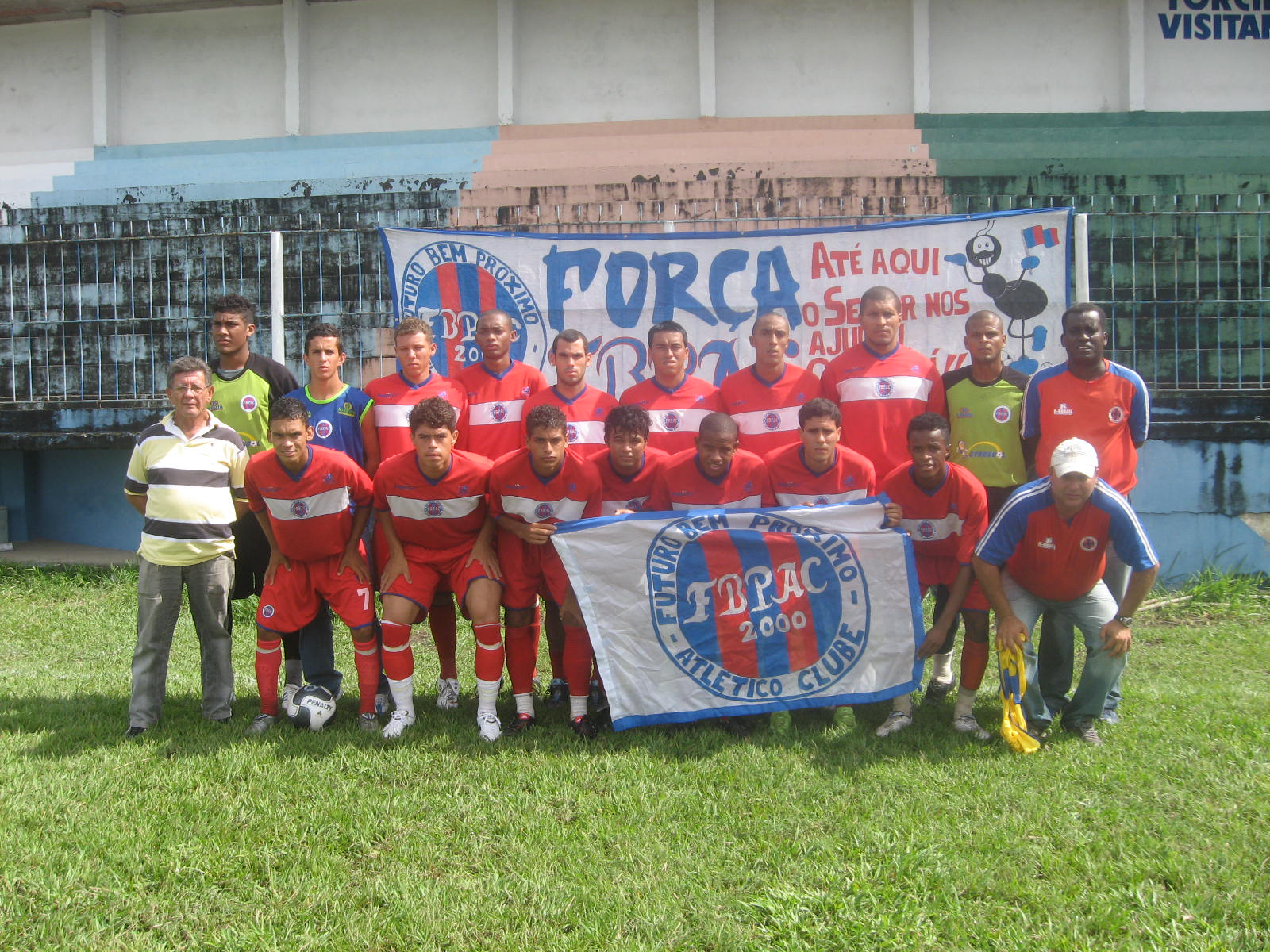 Equipe profissional do Futuro Bem Próximo Atlético Clube em 2010.